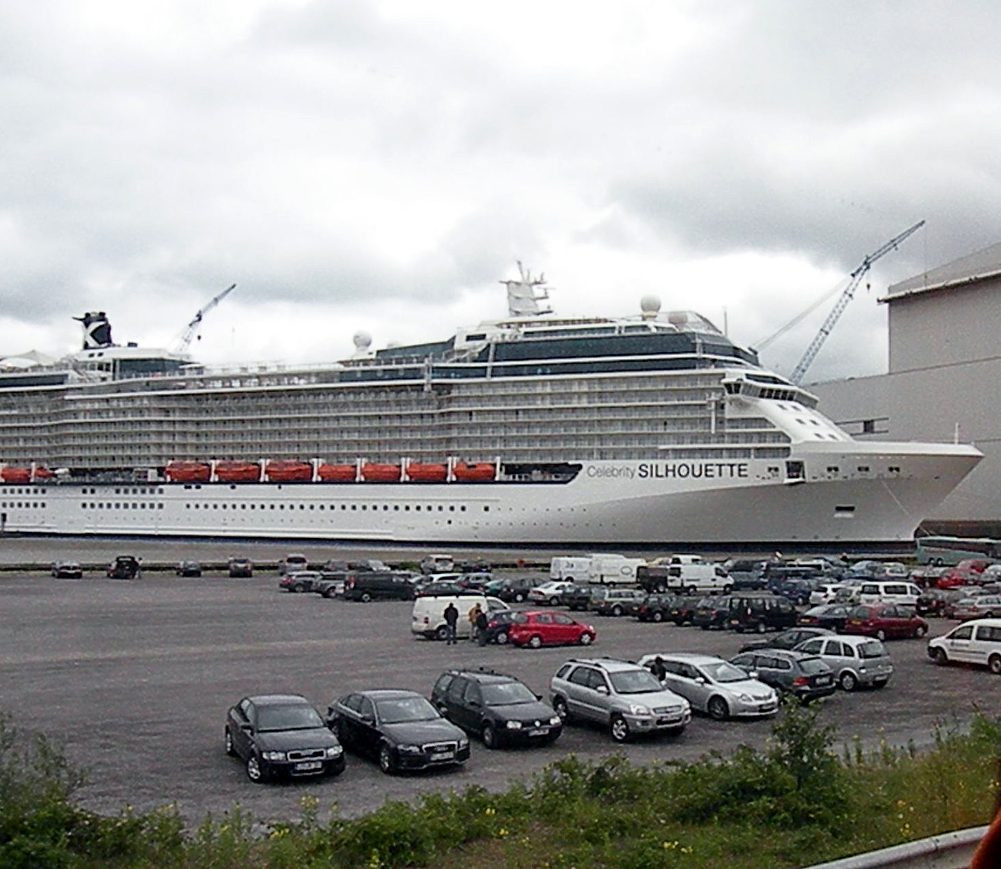 Liner_Silhouette(Ostfriesland)